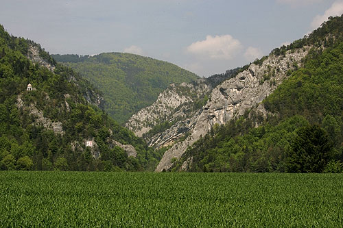 Blick hin zur Klus von Moutier (Gorges de Moutier)